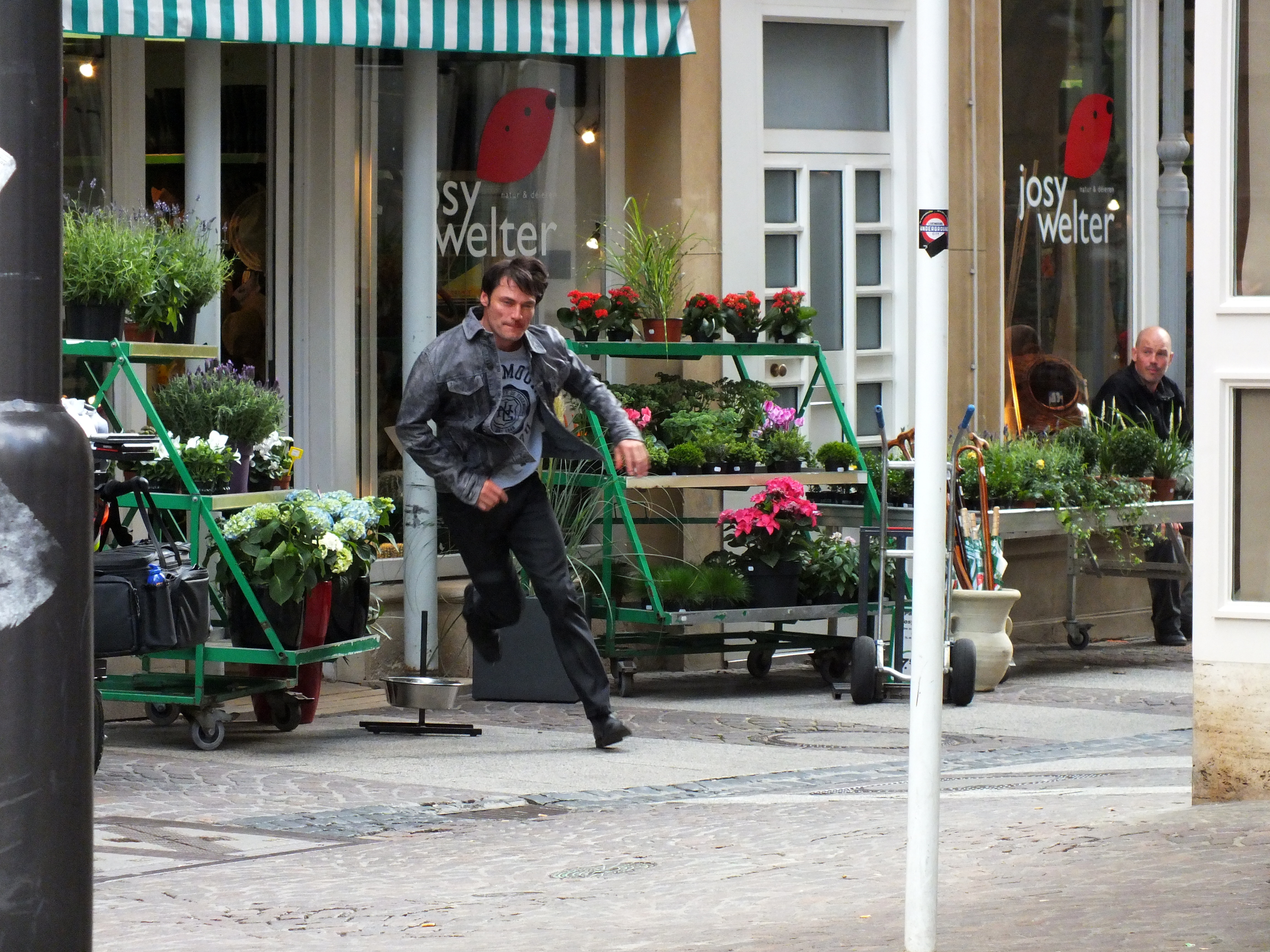 D'Geschäft Josy Welter an der Lantergaass, an der Stad Lëtzebuerg, als Kuliss fir eng Szeen vum Film Doudege Wénkel Handlung: Den Huremovic (Stefan Weinert) op der Flucht virum Inspekter Olivier Faber.